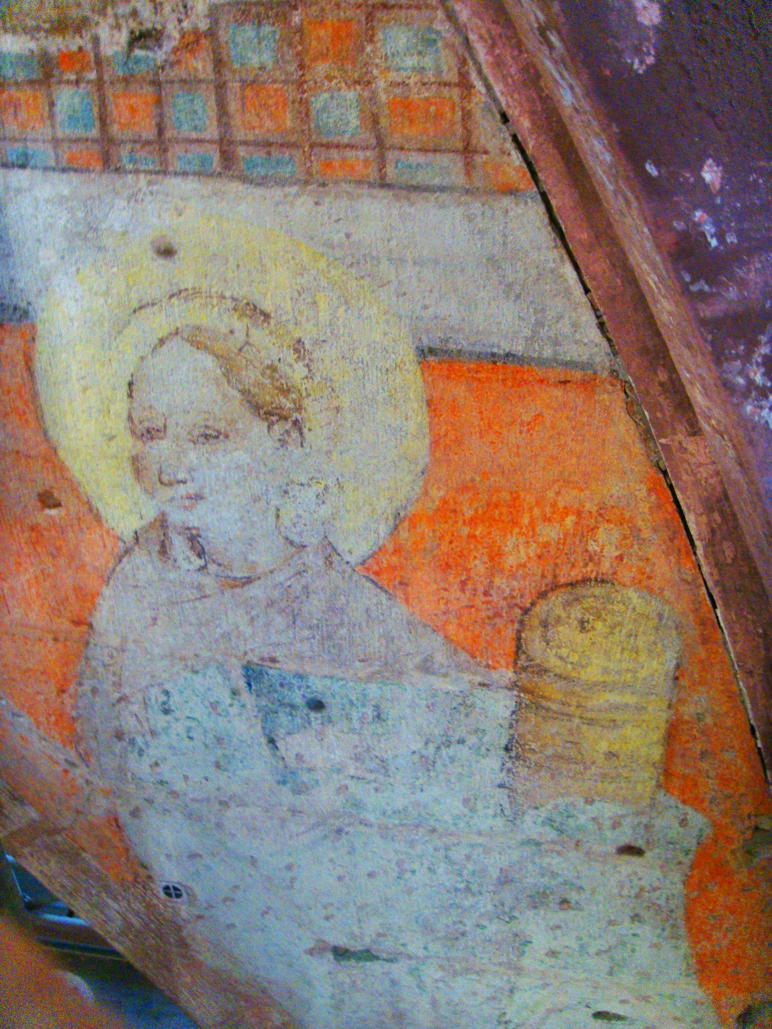 Maria Magdalena mit Salbgefäß, Temperamalerei um 1420, Stiftskirche Neustadt an der Weinstraße, freigelegt 2012 im Prot. Kirchenteil